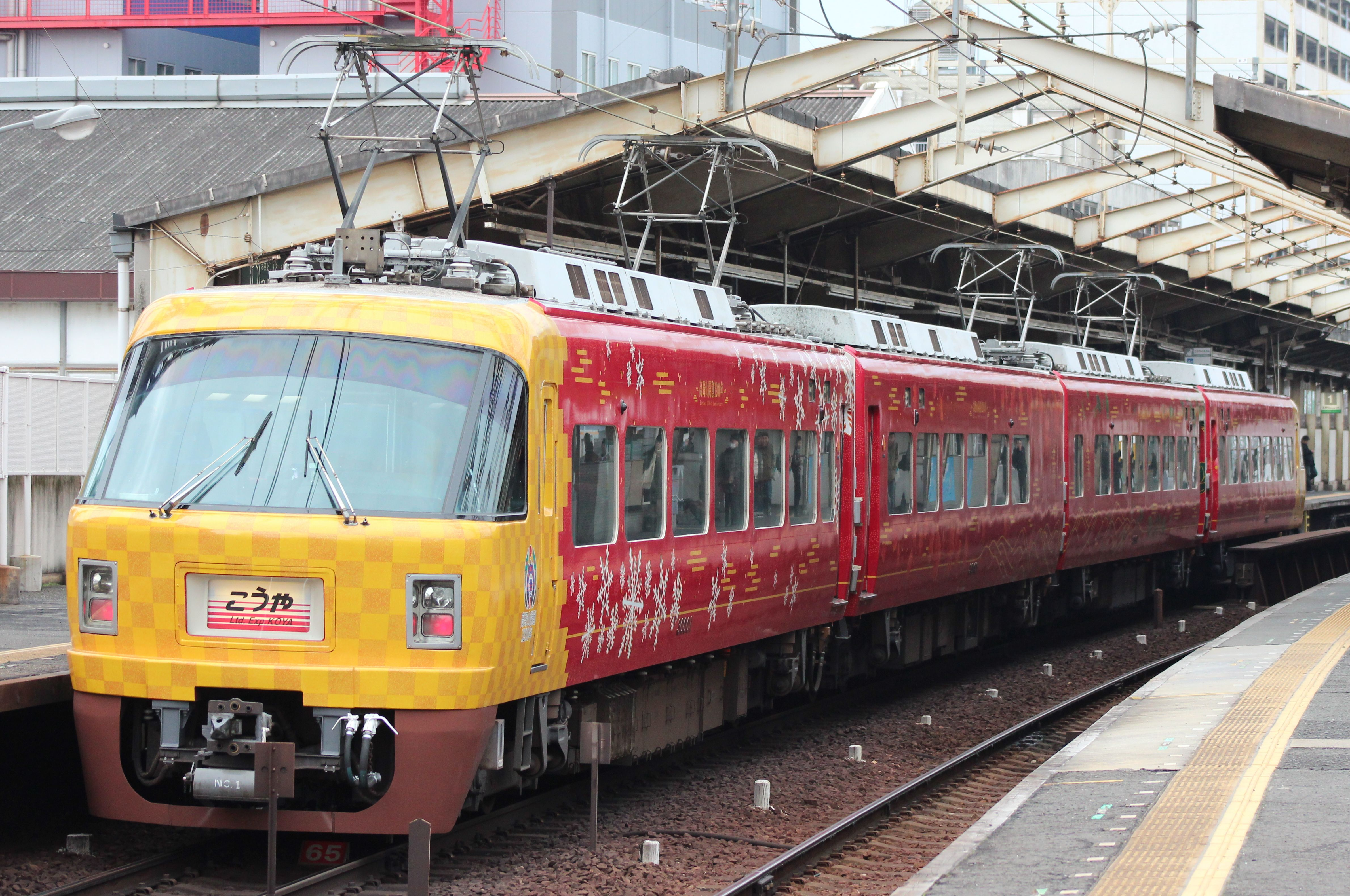 南海30000系電車 30001F「赤こうや」新今宮駅で撮影